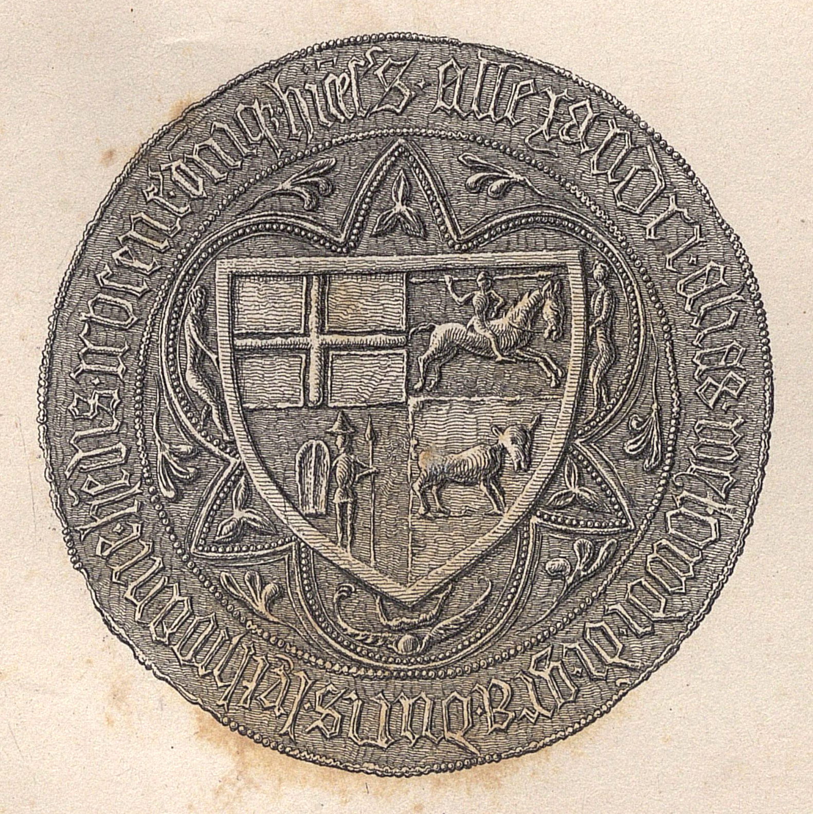 Беларуская (тарашкевіца): Пячаць вялікага князя Вітаўта Вялікага (Vitaŭt Vialiki) з гербам Вялікага Княства Літоўскага Пагоняй (Pahonia)